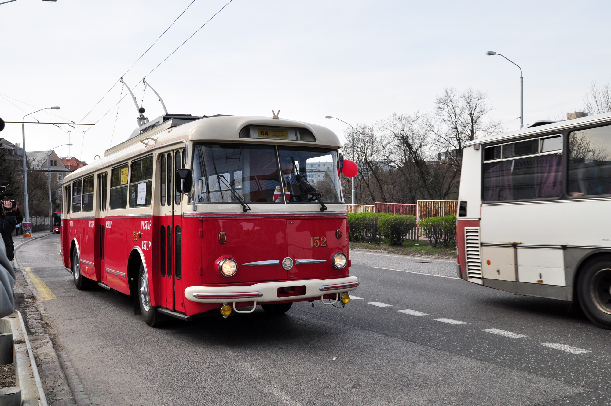 Prevádzka trolejbusovej trate Pražská - Hroboňova